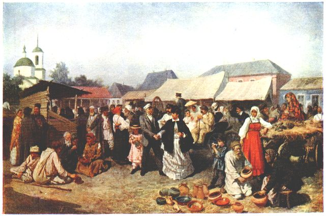 "Базар у провінції" (рос. "Базар в провинции"): Репродукція картини